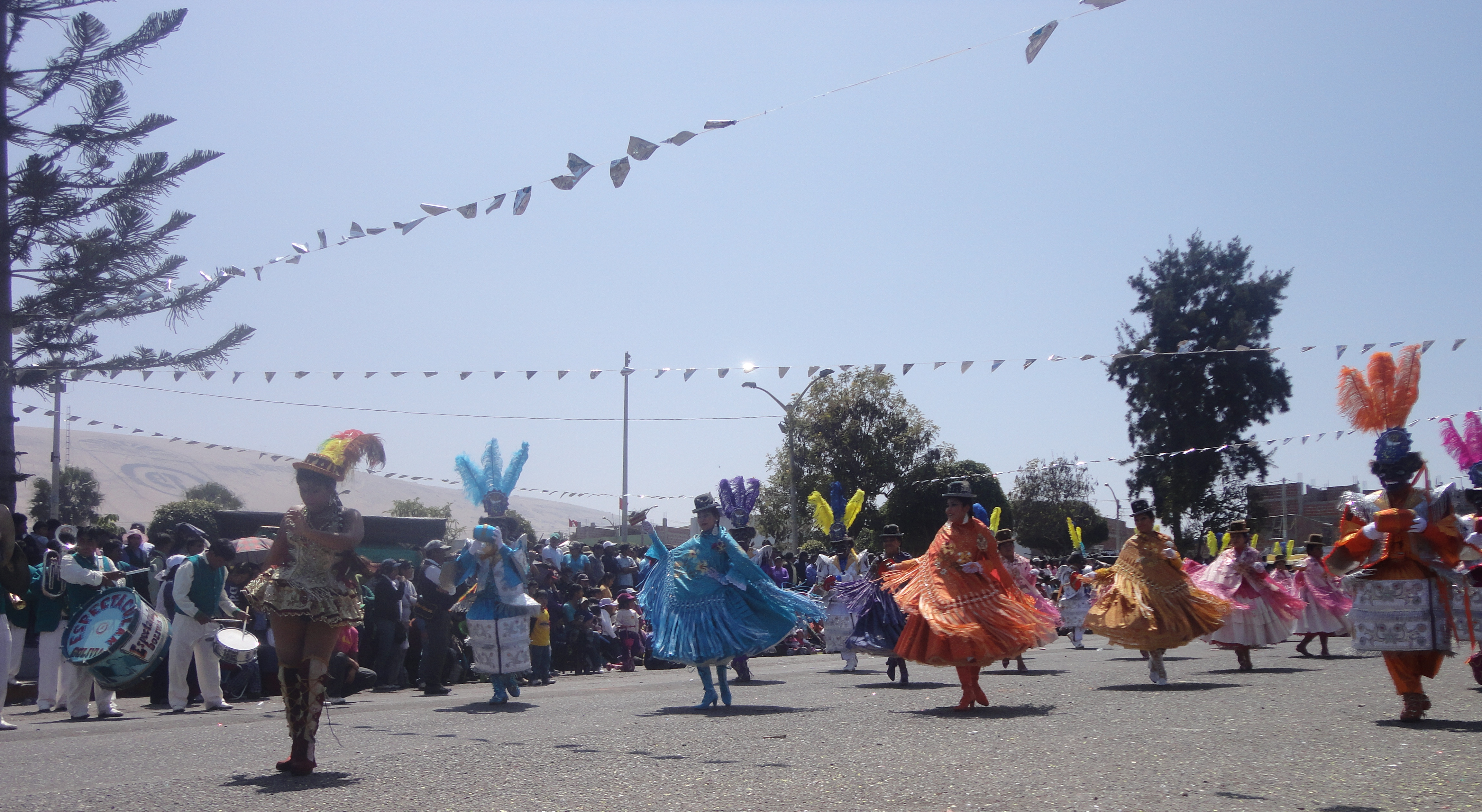 concurso traje de luces san agustin tacna